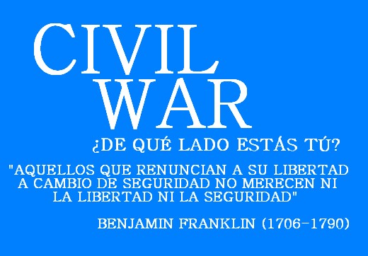 Imitación de parte de un fragmento de una publicidad de la historieta "Civil War" de Marvel Comics